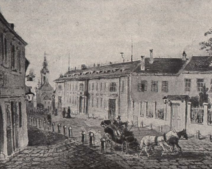 Pałac Matzleinsdorf